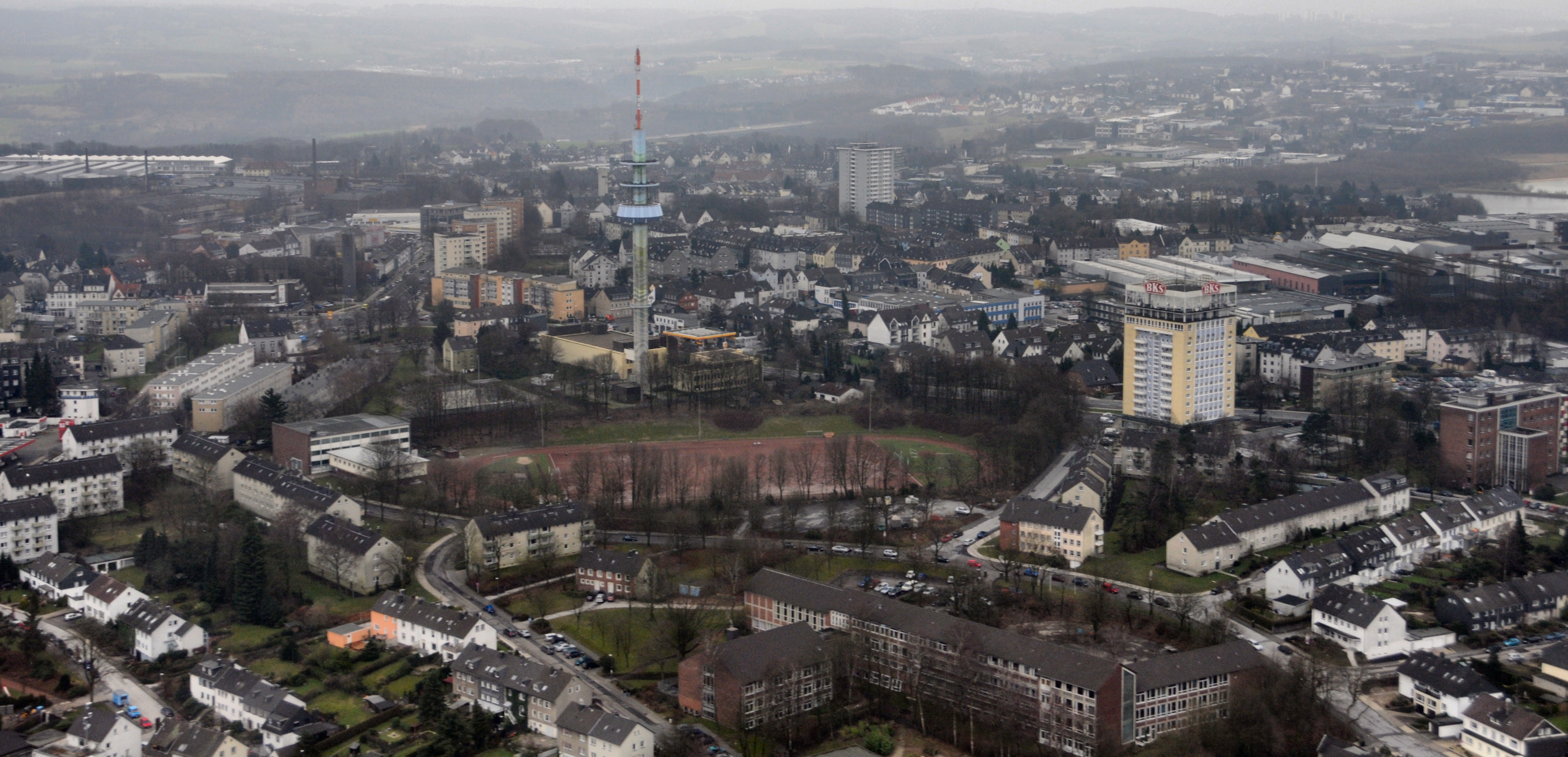 Luftbild von Velbert mit BKS-Turm